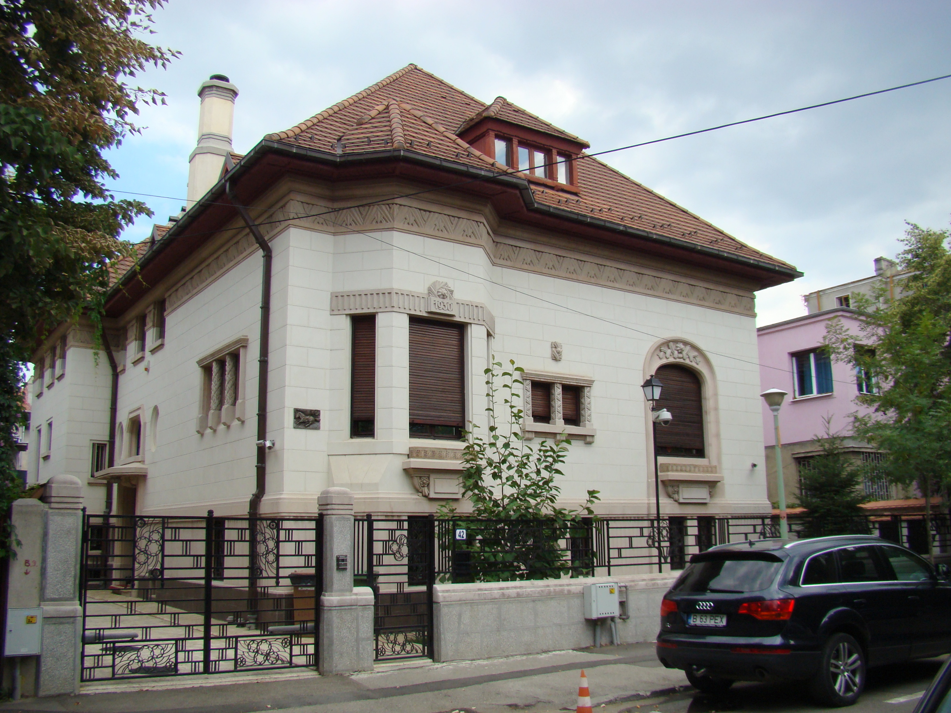 Casă monument istoric, str.Londra, nr.42 (Vila Elena)